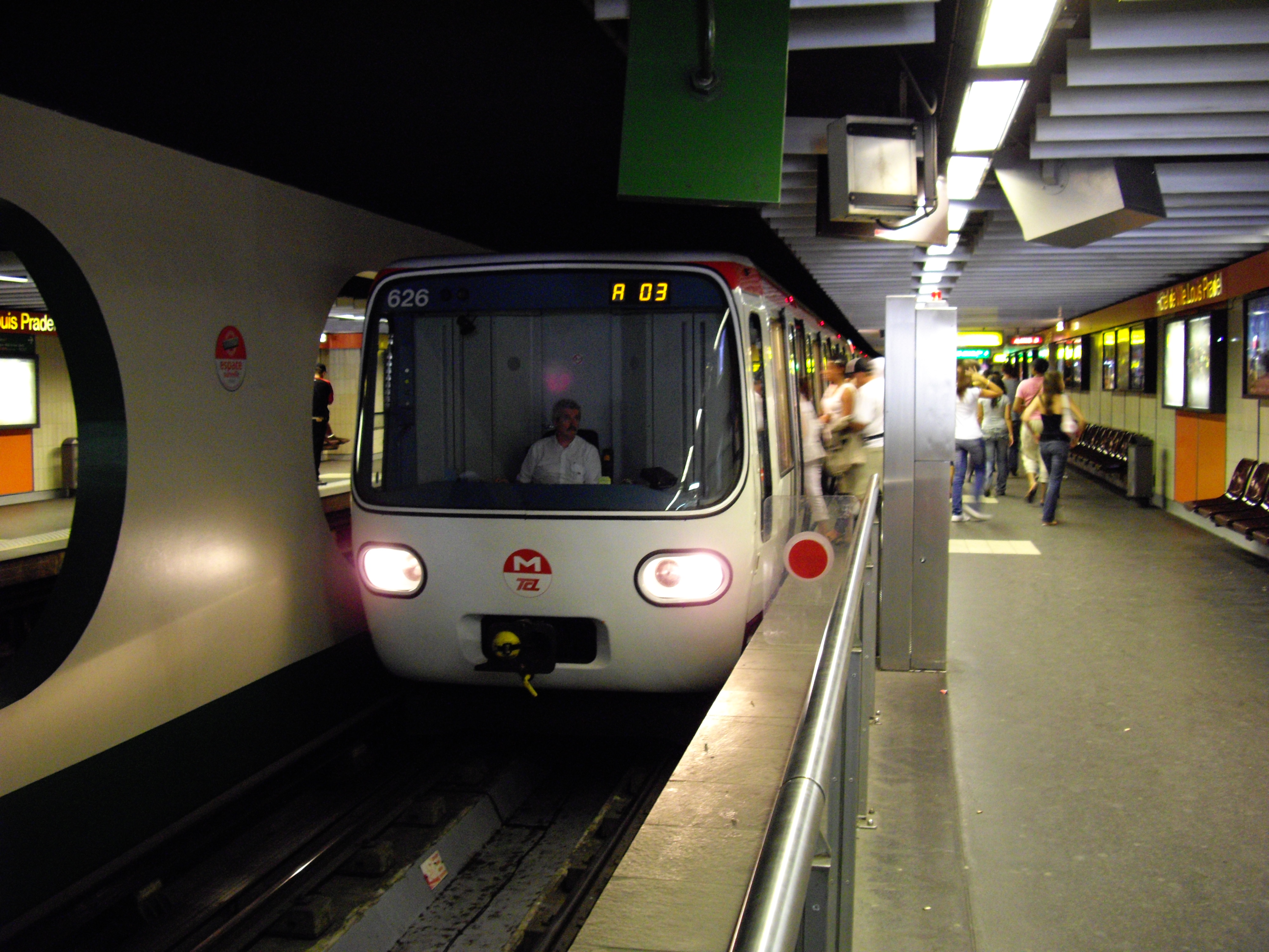 La rame 26 sur la ligne A, à la station Hôtel de Ville Louis Pradel